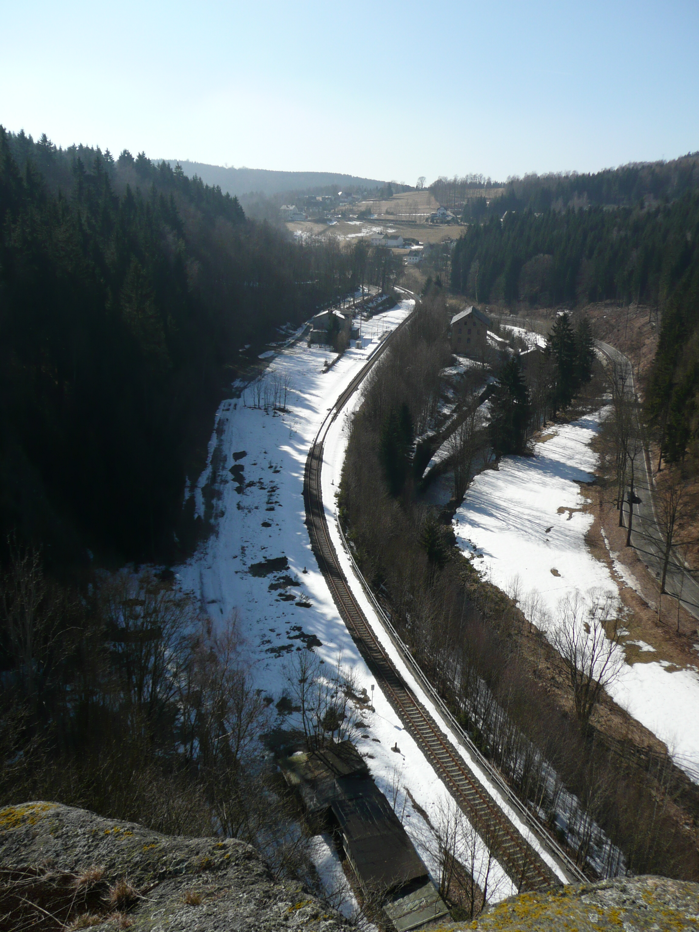 Blick vom Löwenkopffelsen (Standort der abgegangenen Burg Nidberg) auf das Areal des ehem. Bahnhofs Zöblitz-Pobershau der Flöhatalbahn - im Bildhintergrund Häuser von Rittersberg